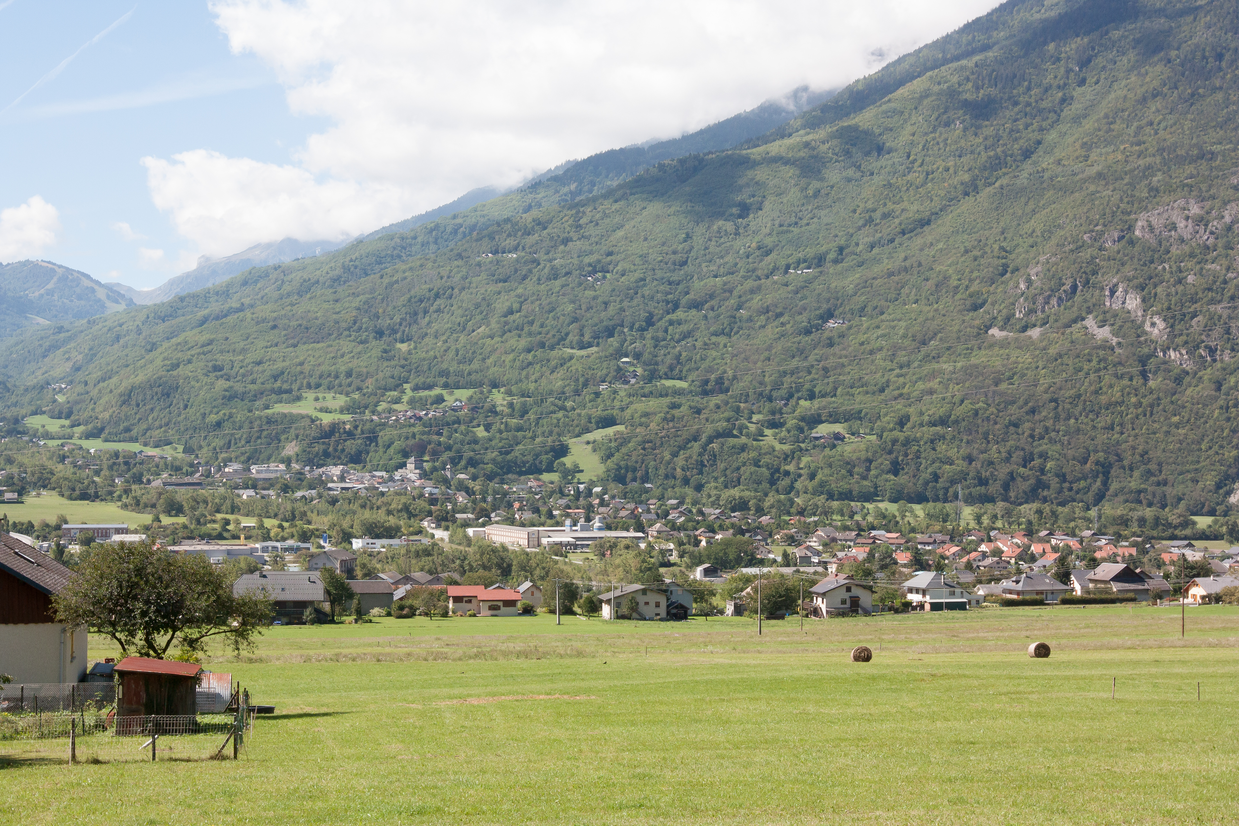 Vue de Saint-Étienne-de-Cuines depuis Saint-Avre / Saint-Étienne-de-Cuines / Savoie / France